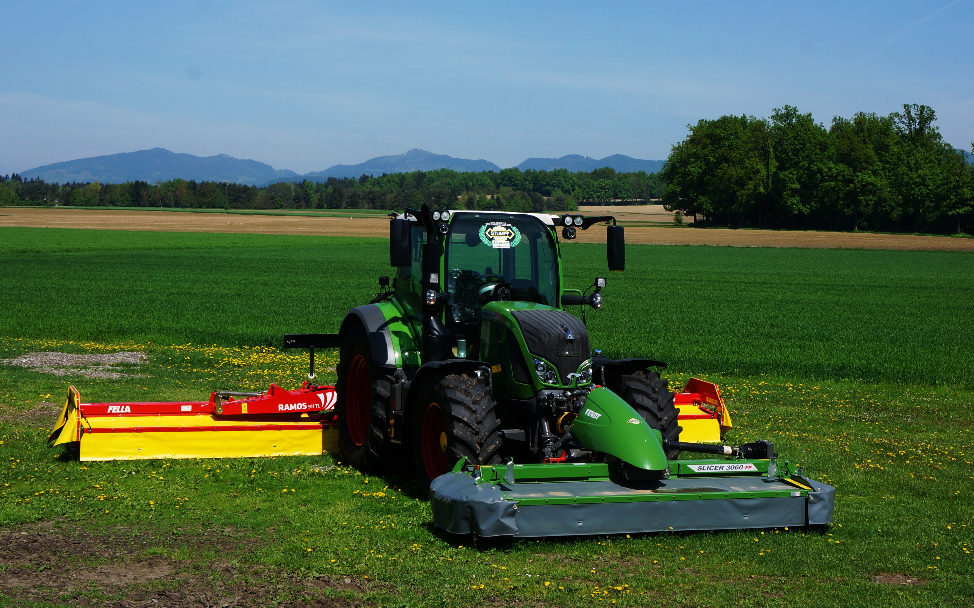 Traktor mit Mähwerk, Modell Fella Ramos 911 TL für die Bearbeitung von Großflächen in der Landwirtschaft, Kärnten, Österreich, EU